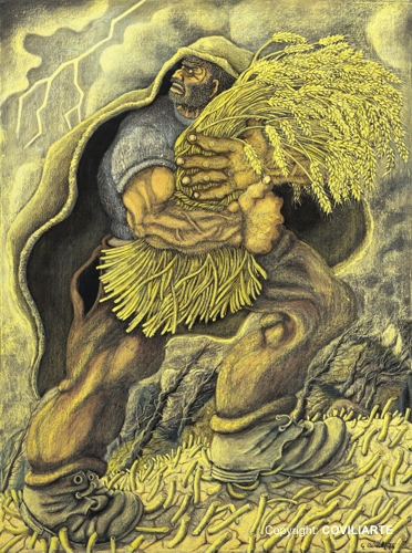 Gino Covili, L'ULTIMO COVONE, 1974 tecnica mista su tela cm 120 x 90